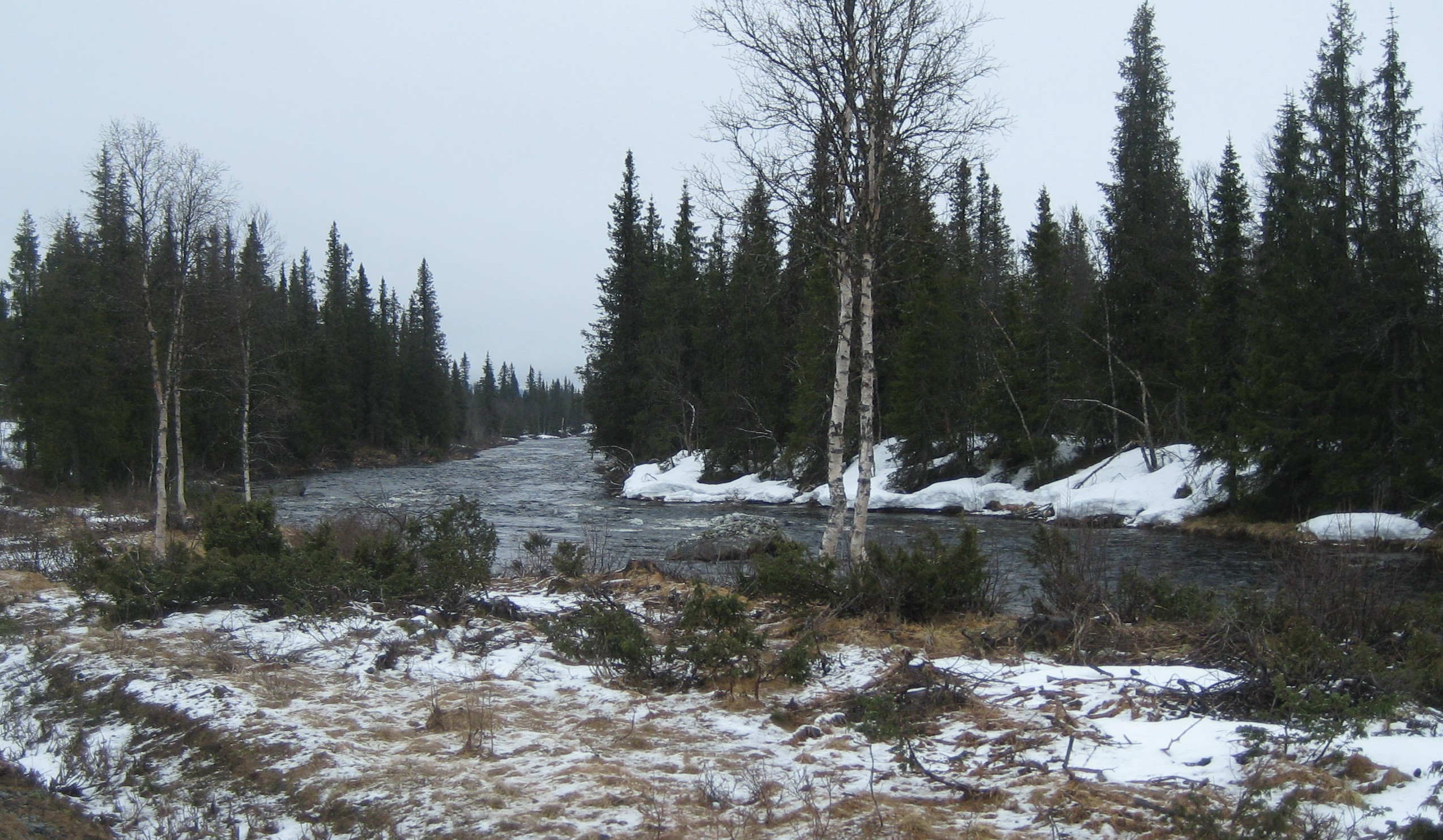 Synna i Torpa.